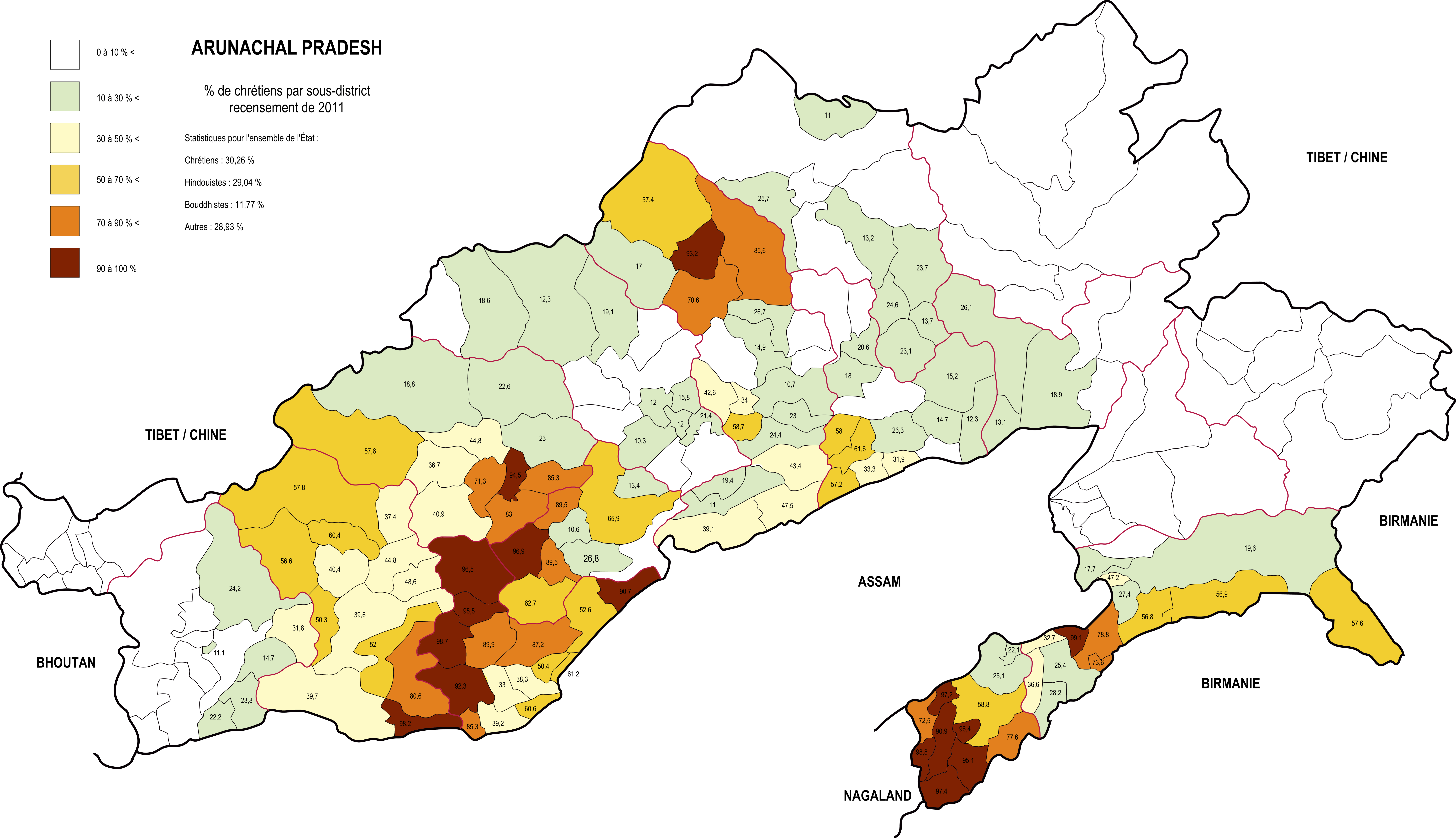 Arunachal Pradesh : % de chrétiens par sous-district selon les données du recensement indien de 2011.